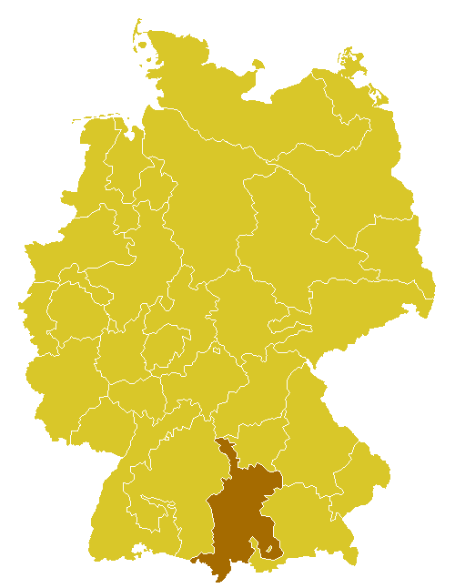 Beschreibung: Katholische Diözese/Bistum Augsburg in Deutschland